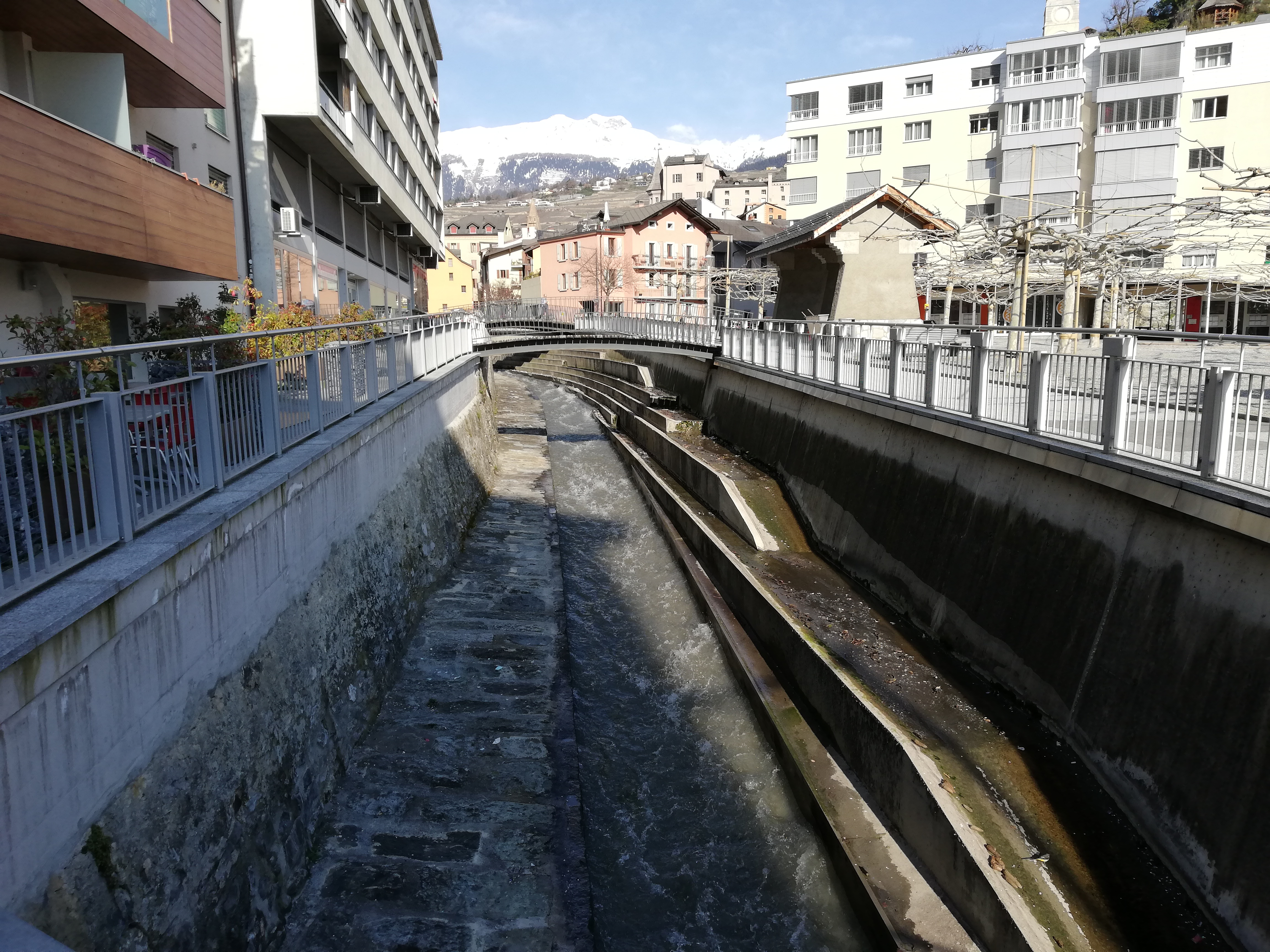 Photo de la Sionne, au centre ville de Sion